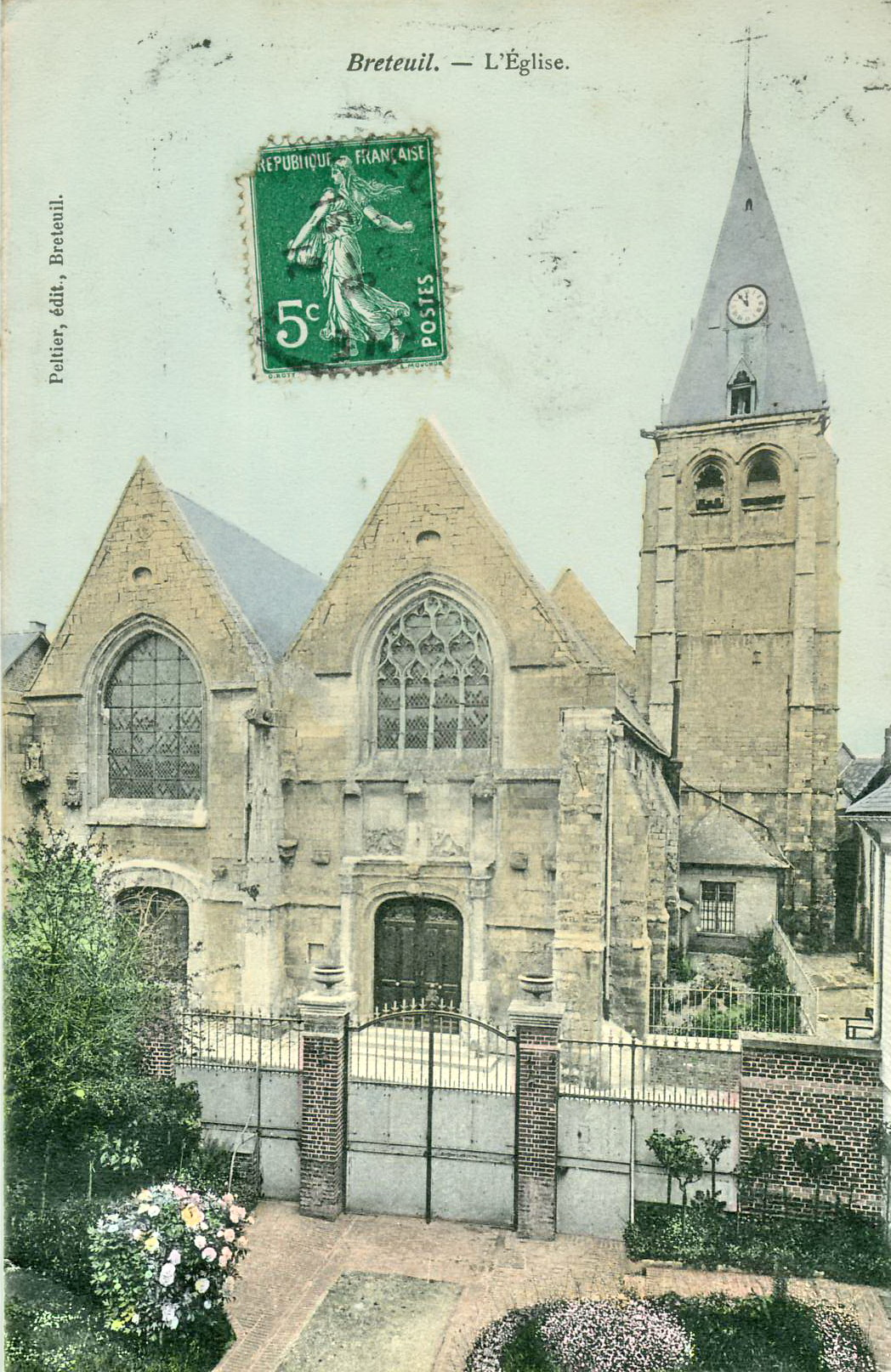 Carte postale ancienne éditée par Peltier Breteuil (Oise) : L'église